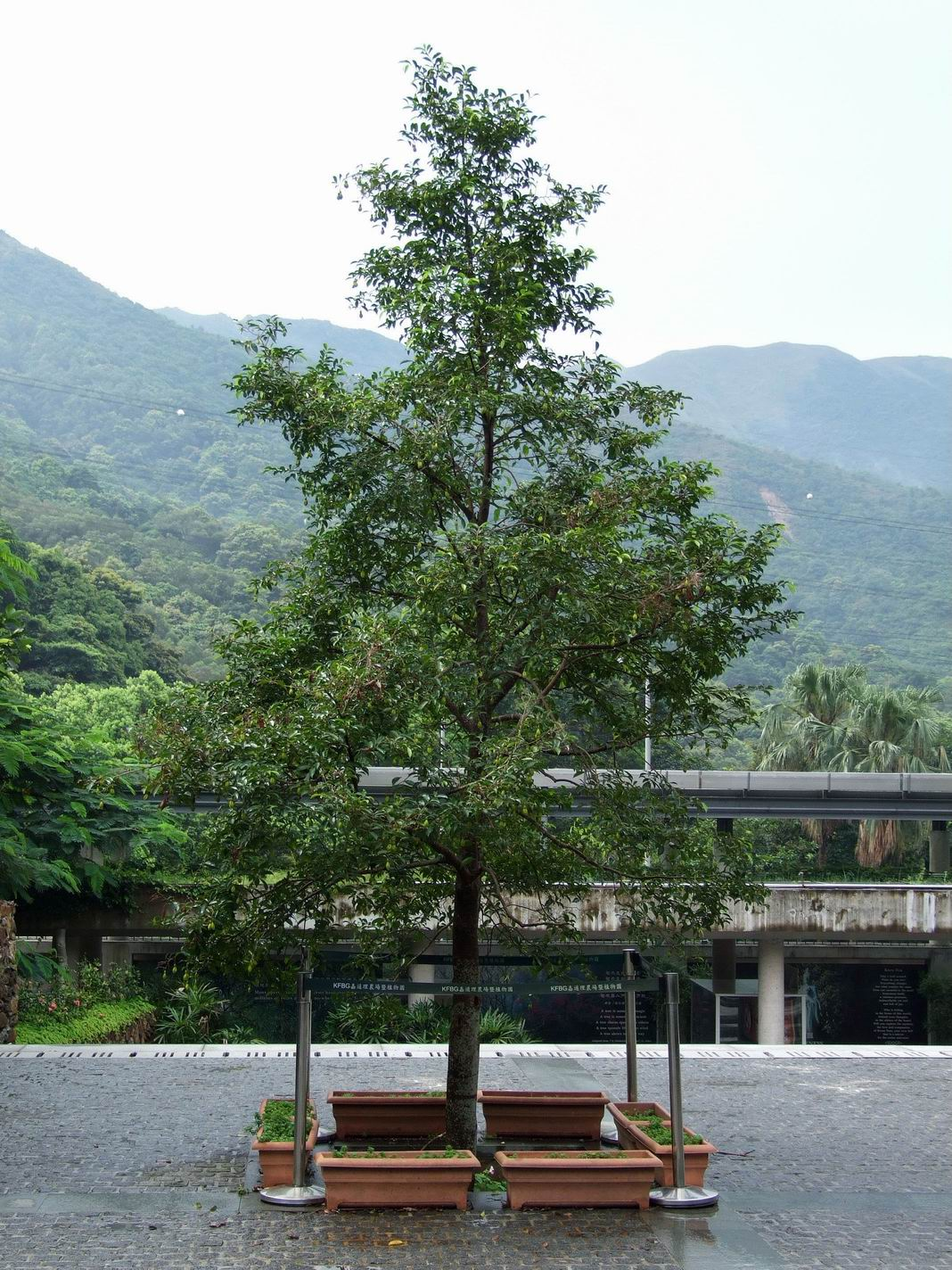 中文（香港）: 牙香樹